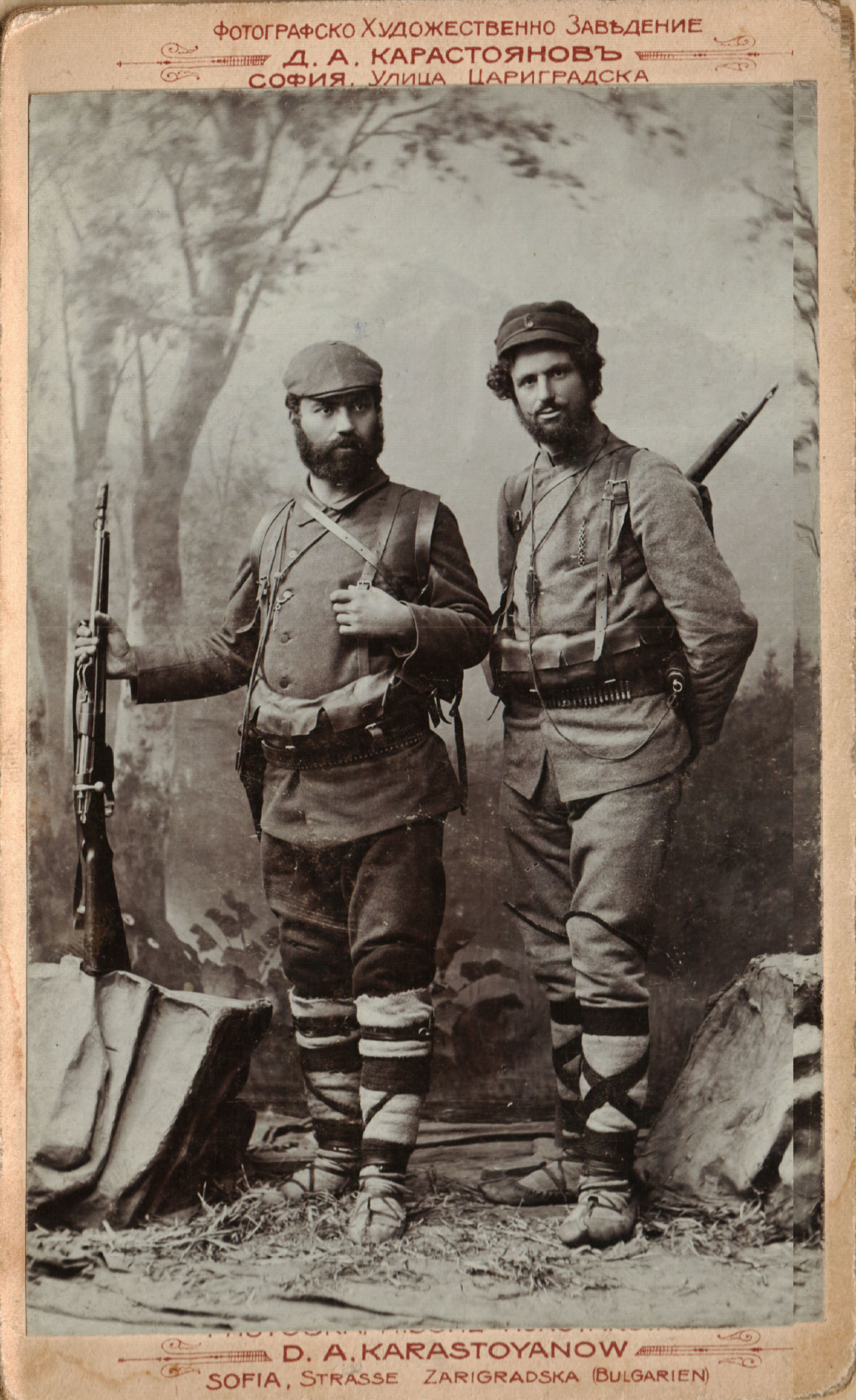 Мингьо Тодев и Кочо Молеров в 1903 година.